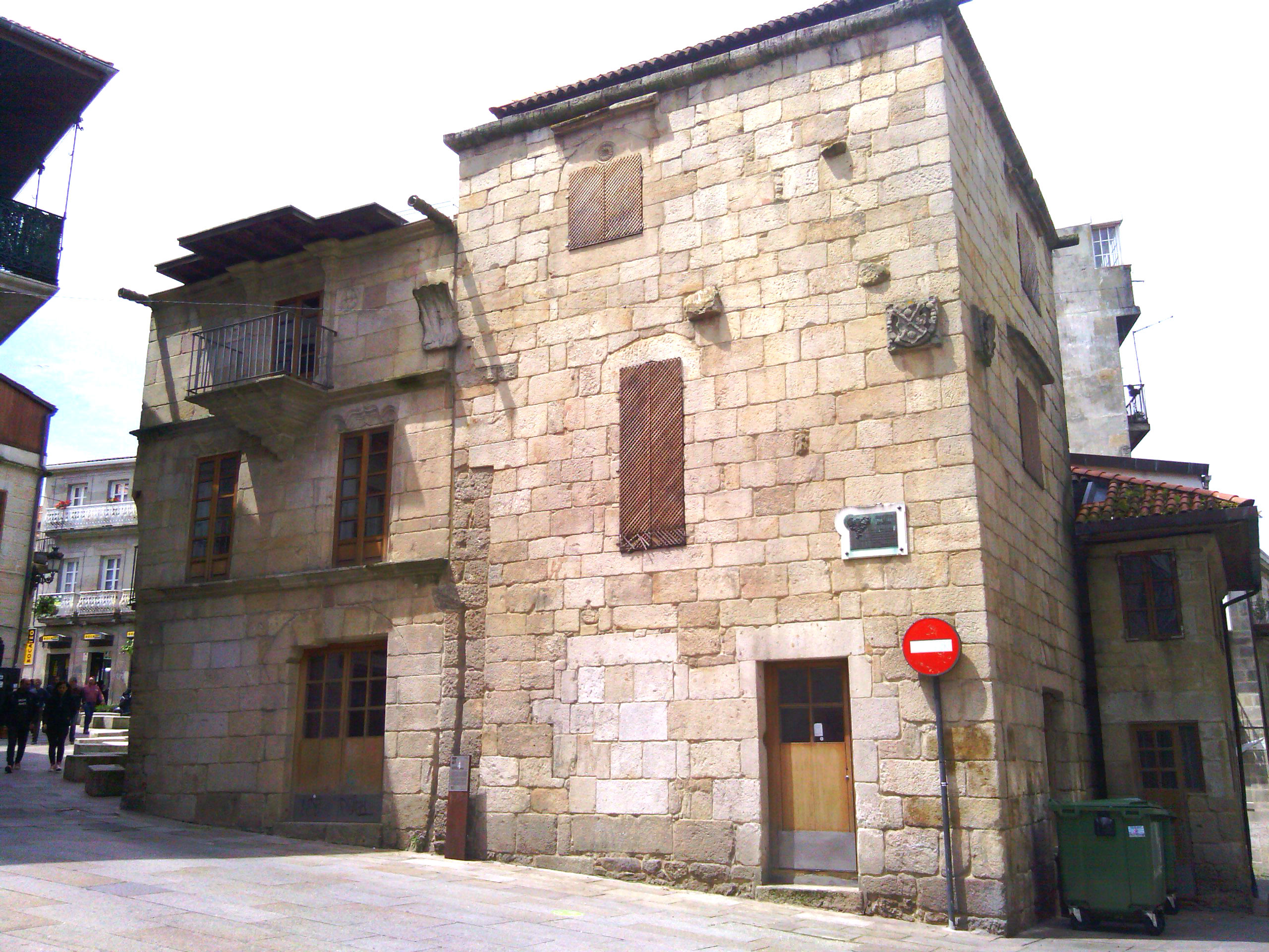 Conjunto histórico-artistico de Casa Torre de Pazos Figueroa y Casa Torre de Ceta y Arines, en Vigo. Actual sede del Instituto Camôes